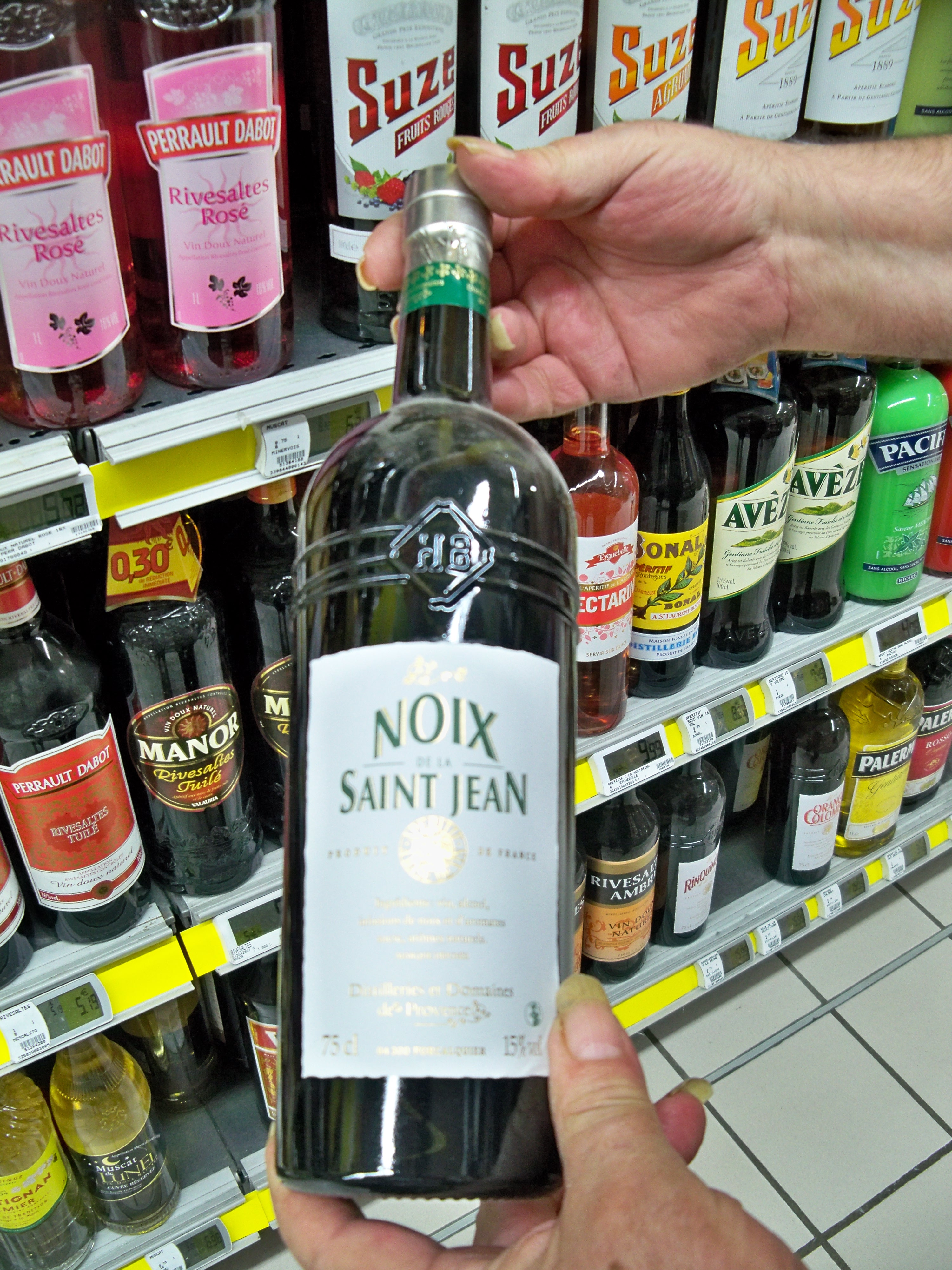 Bouteille de Vin de Noix